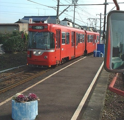 赤土坂駅で交換するja:名鉄モ870形電車